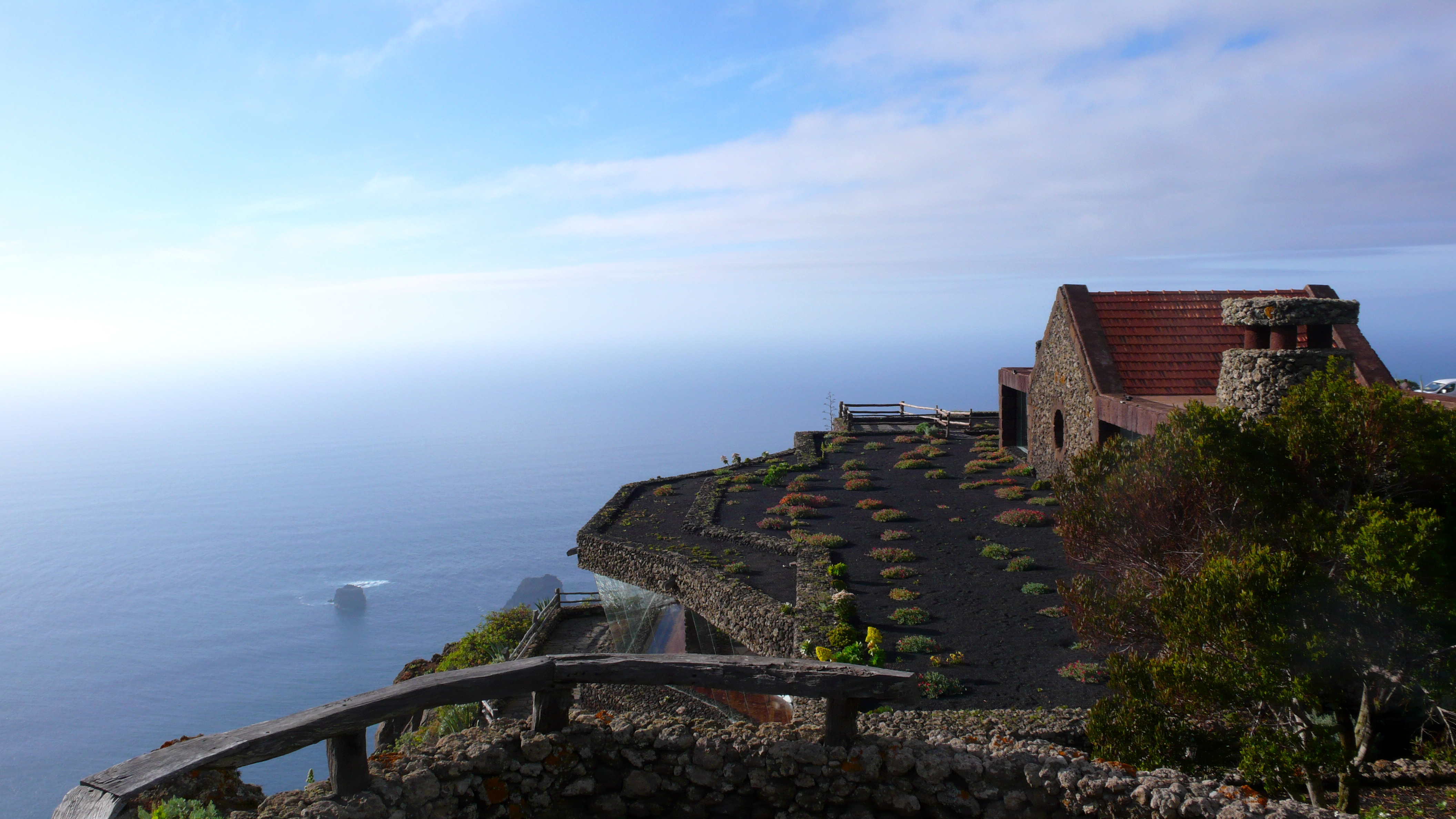 Exterior del Mirador de la Peña, El Hierro, Islas Canarias, España